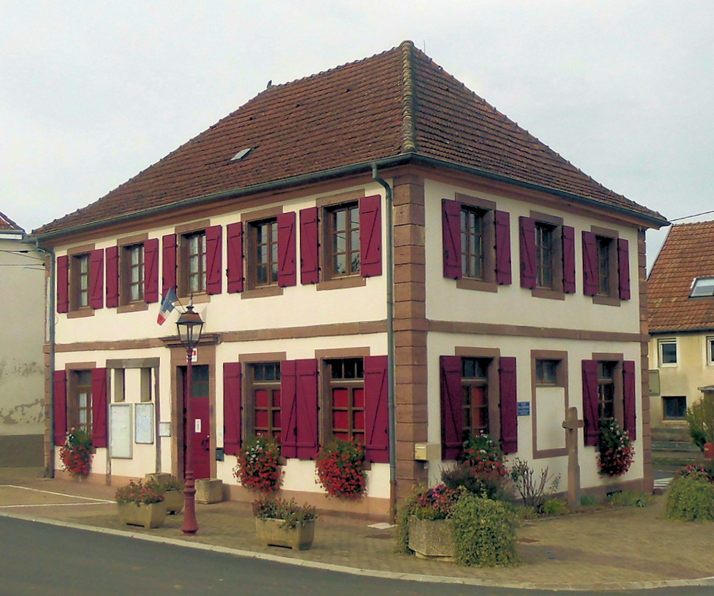 La mairie de Denney, côté sud-est